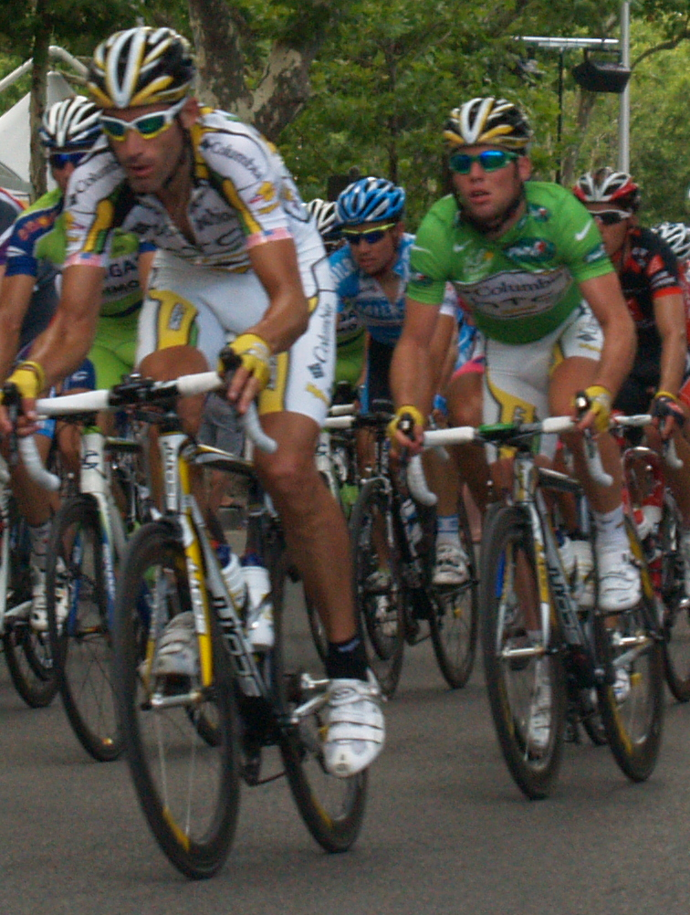 Peloton du Tour de France 2009 en Arles.